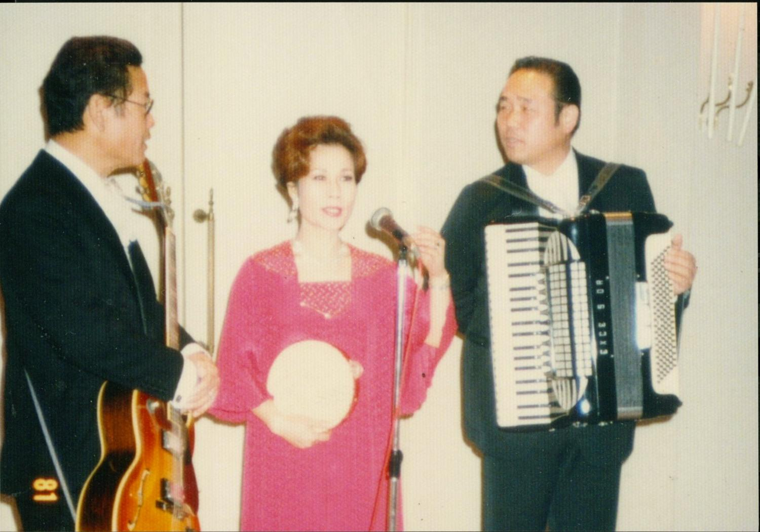 西川ひよ子（写真中央）。1980年頃に撮影されたもの。